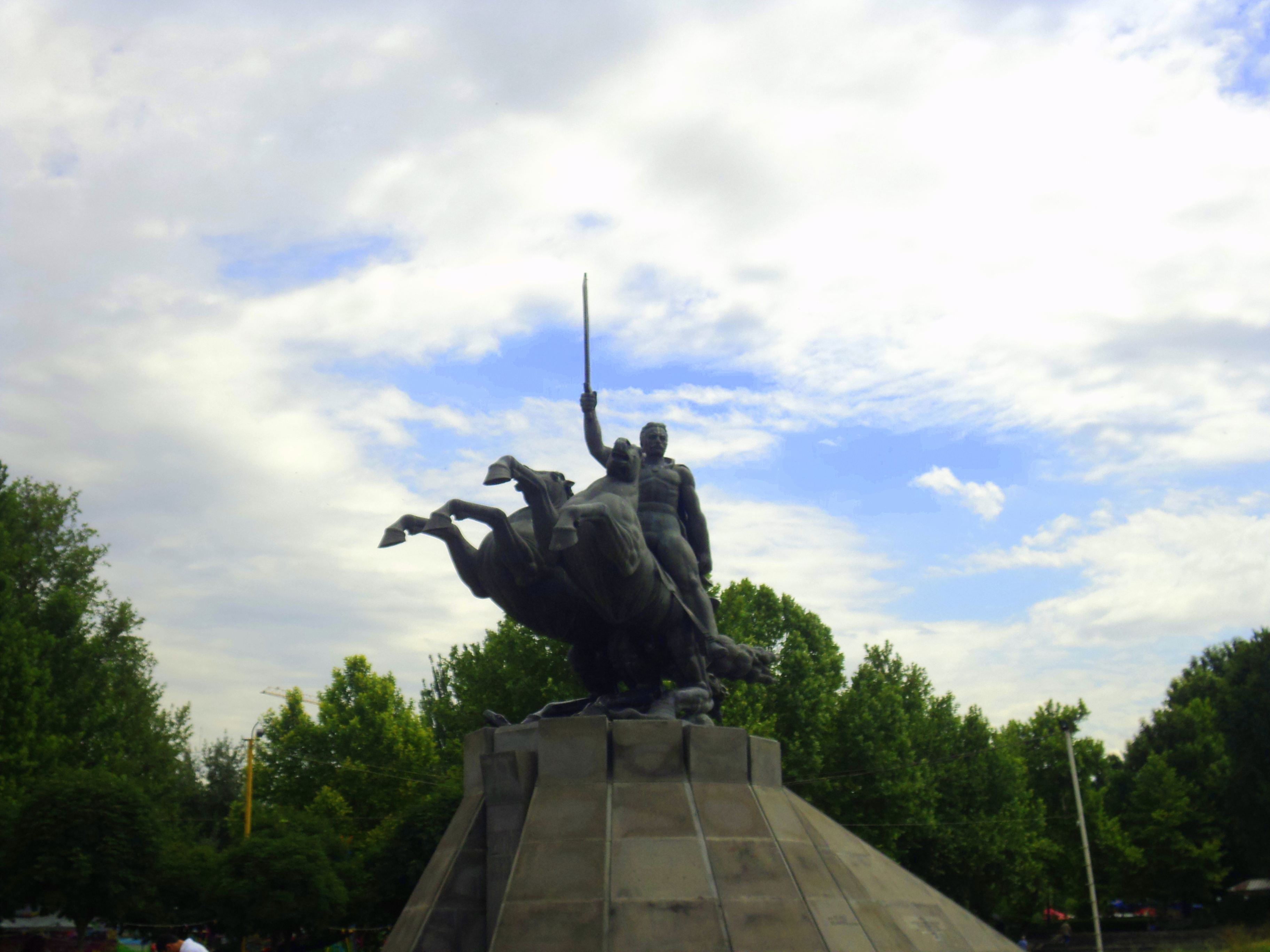 Անդրանիկ Օզանյան-բրոնզ և բազալտ, հեղինակ`Արա Շիրազն, ճարտարապետ՝ Ասլան Մխիթարյան։ Տեղադրվել է 2002 թվականին Տիգրան Մեծ պողոտայում, Գրիգոր Լուսավորիչ եկեղեցու դիմաց: Երկու ձիերը խորհրդանշում են Արևելյան և Արևմտյան Հայաստաները